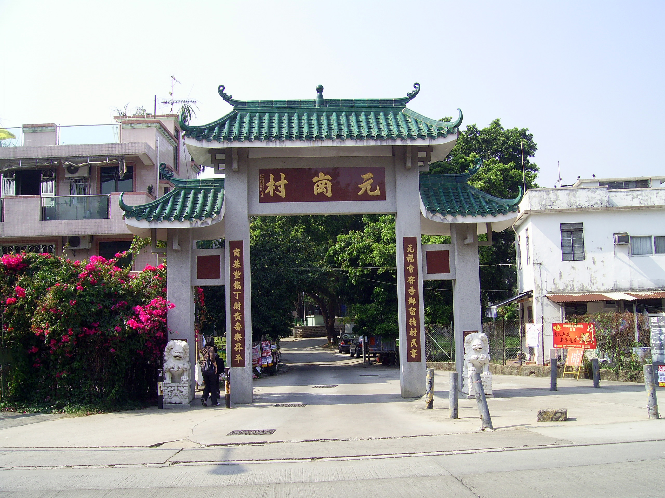 中文（香港）: 元崗村牌樓